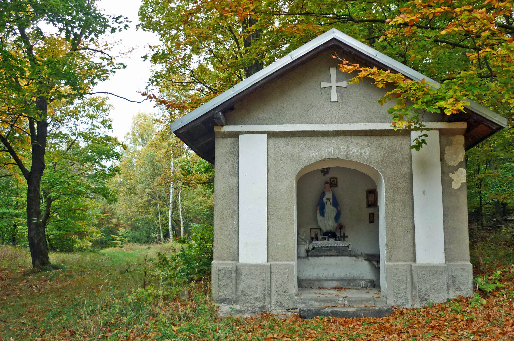 Chlumecká kaple Bolestné Panny Marie, v horském pásmu severozápadně od města Chlumec, na hranici katastrů Fojtovice a Unčín města Krupka, okres Teplice.